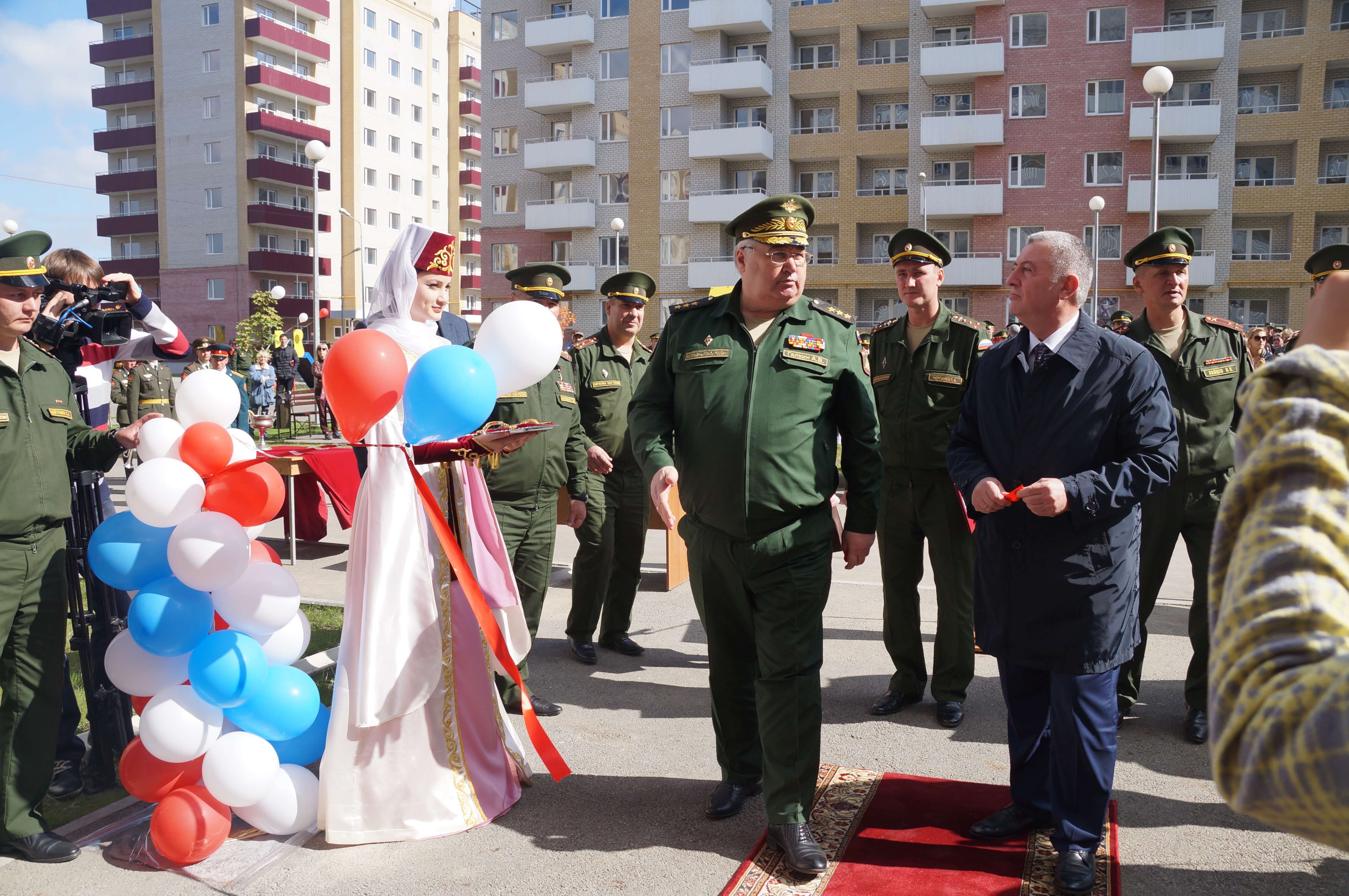 Командующий ЮВО открывает новый жилой городок во Владикавказе, 2014 год